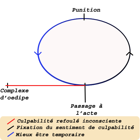 Schéma décrivant le processus psychologique de la culpabilité pour la psychanalyse.